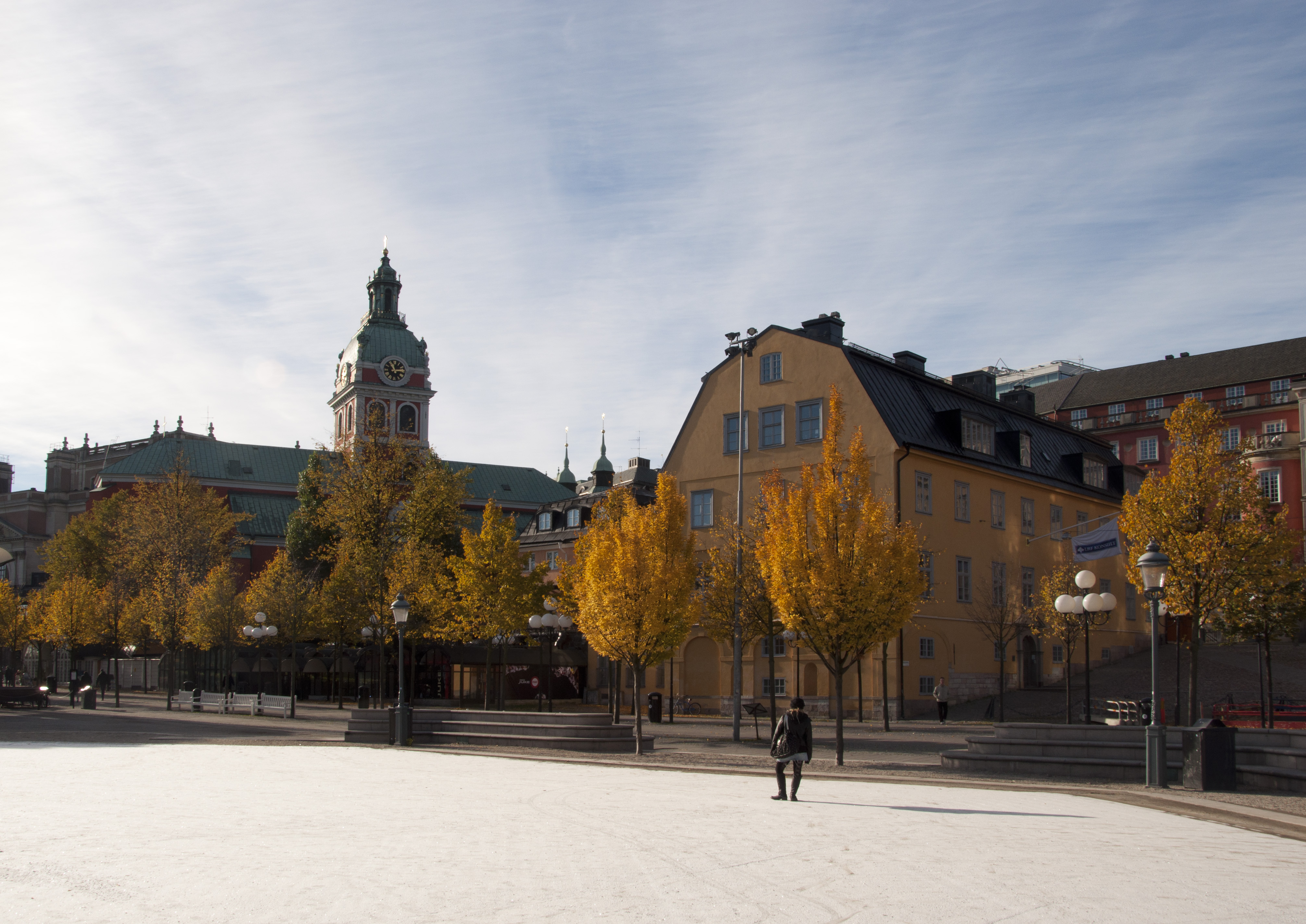 Kungsträdgården